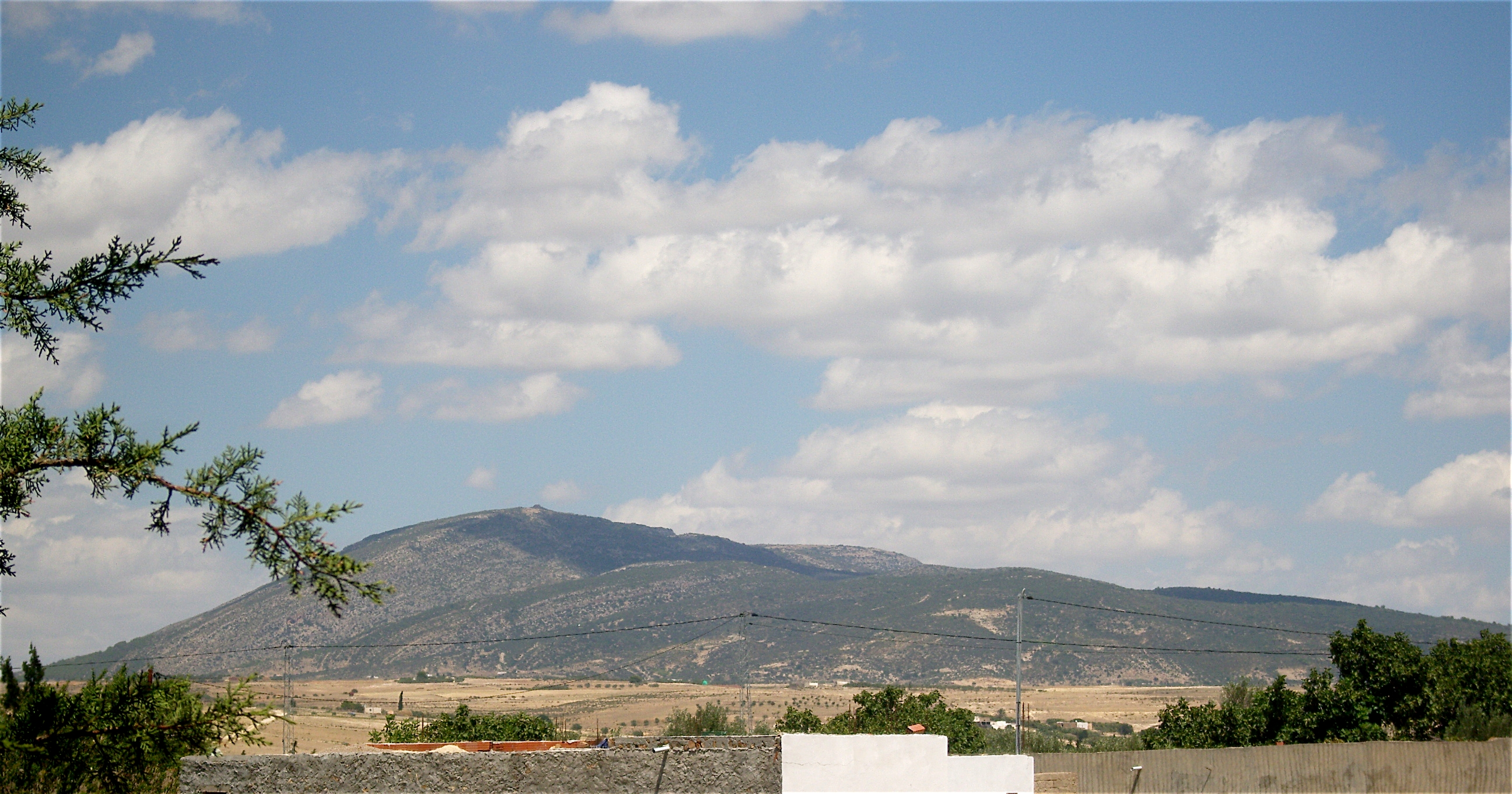 Vue du versant occidental du Djebel Bargou (Siliana - Tunisie)